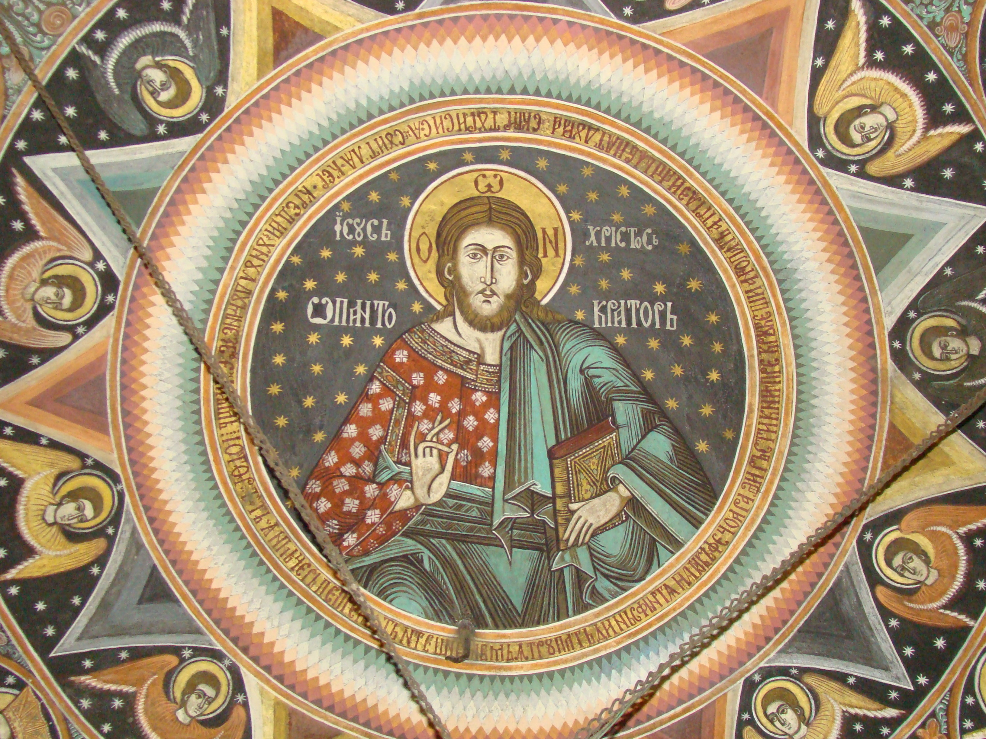 Biserica "Adormirea Maicii Domnului", sat Arpașu de Sus; comuna Arpașu de Jos, județul Sibiu